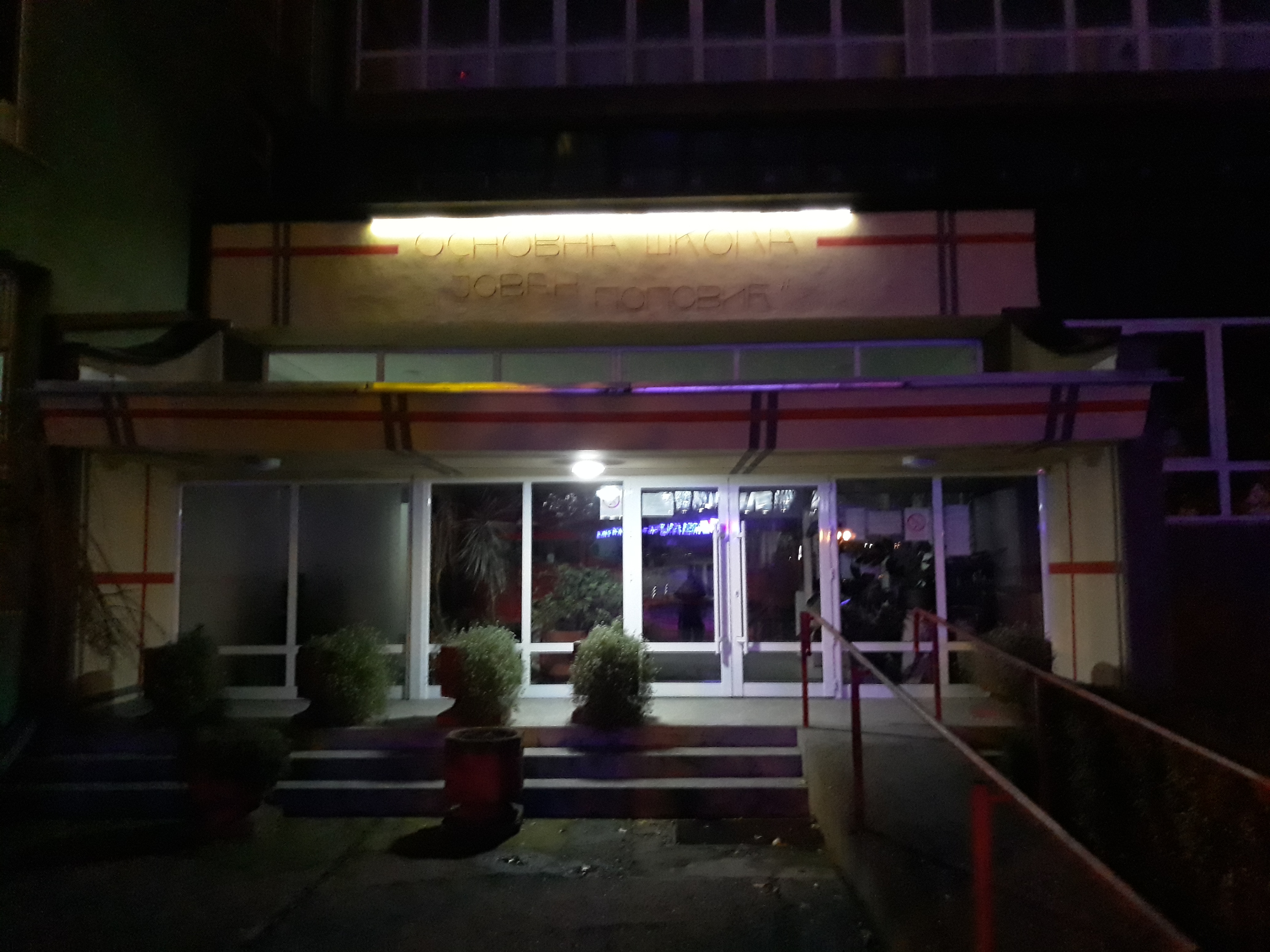 Основна школа „Јован Поповић”